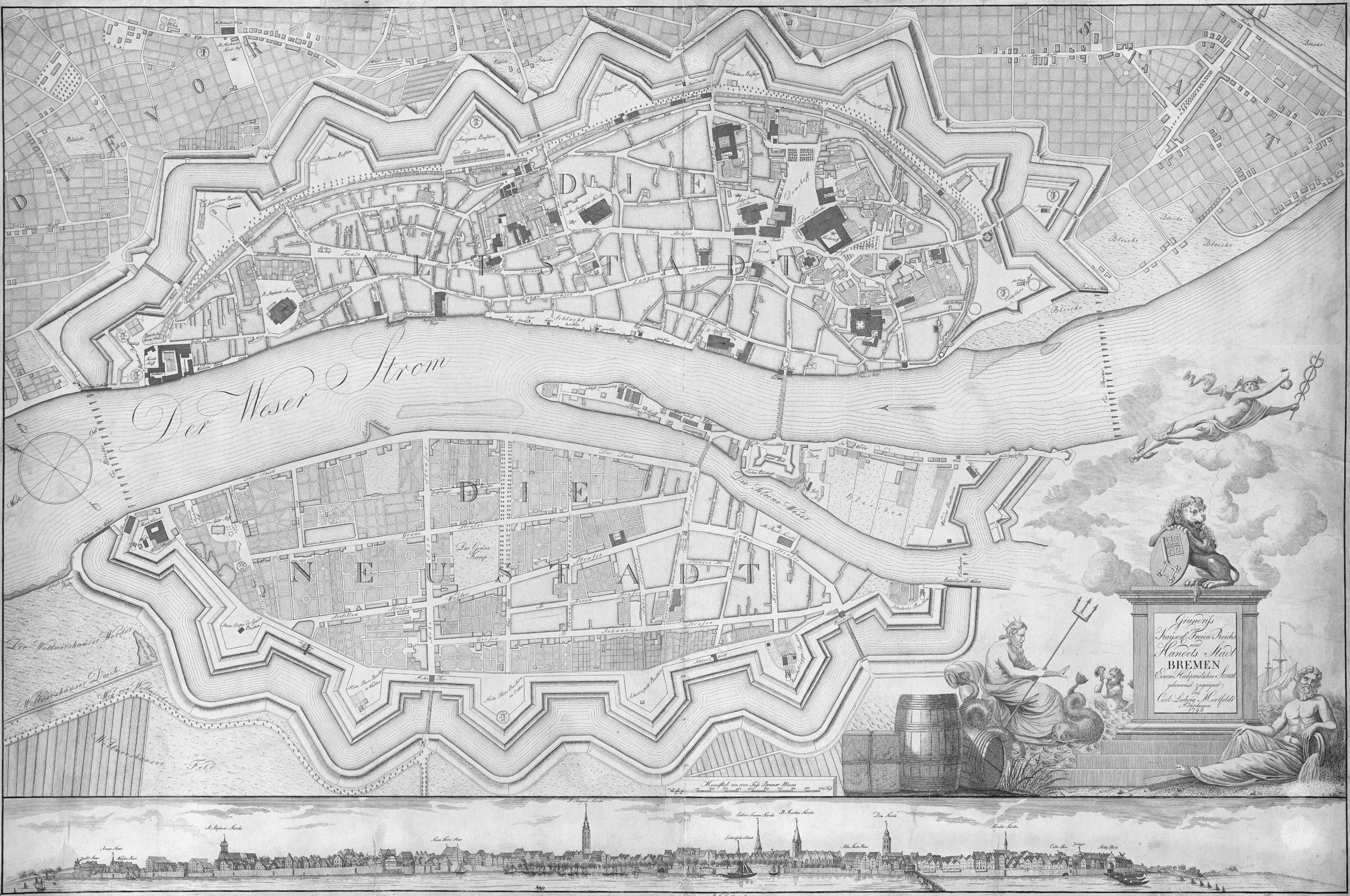 Stadtplan von Bremen aus dem Jahr 1796 von Carl Ludwig Murtfeldt, Originaltitel: Grundriſs der Kayserl. Freien Reichs und Handels Stadt Bremen; Achtung: Die Karte wurde in vier Teilen gescannt und dann aus vier Dateien wieder zusammengefügt. Dadurch ist die Darstellung der Weser in der linken Kartenhälfte vertikal etwas gestaucht.